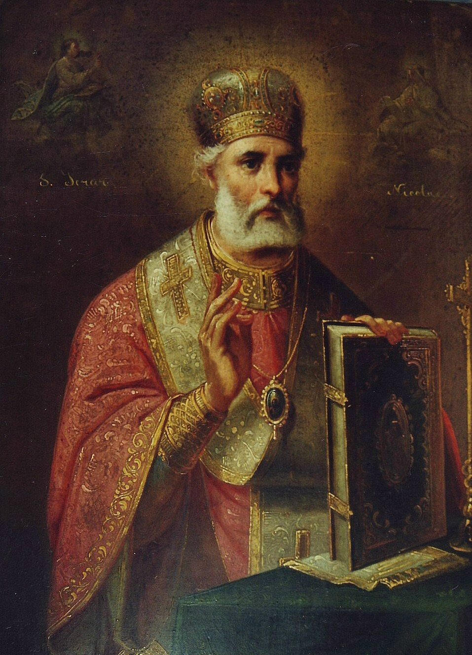 Gheorghe Tattarescu - Sfântul Nicolae, Muzeul Municipiului Bucureşti, 39x29 cm.